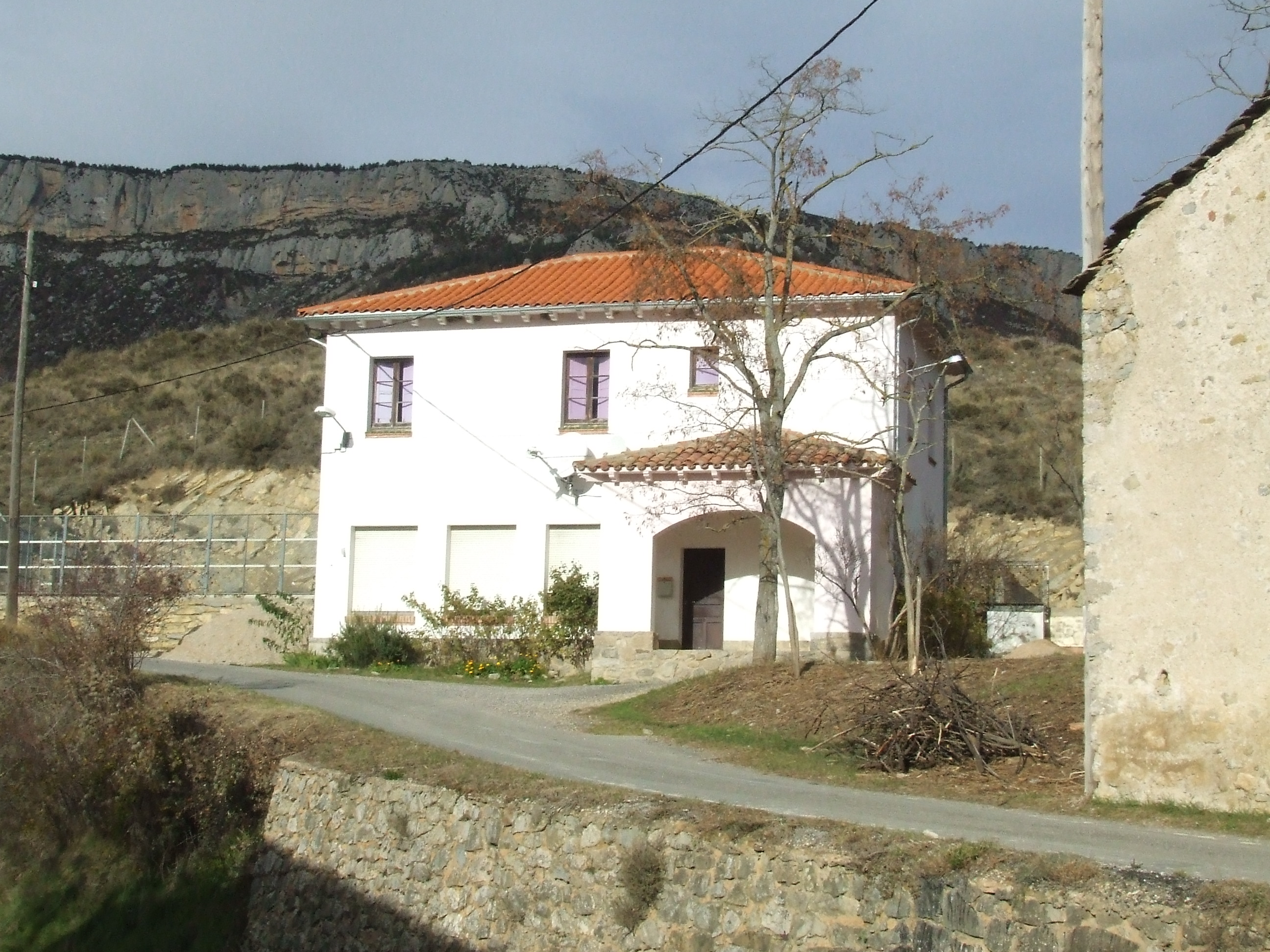 Les Escoles de Bóixols (Abella de la Conca, Pallars Jussà)